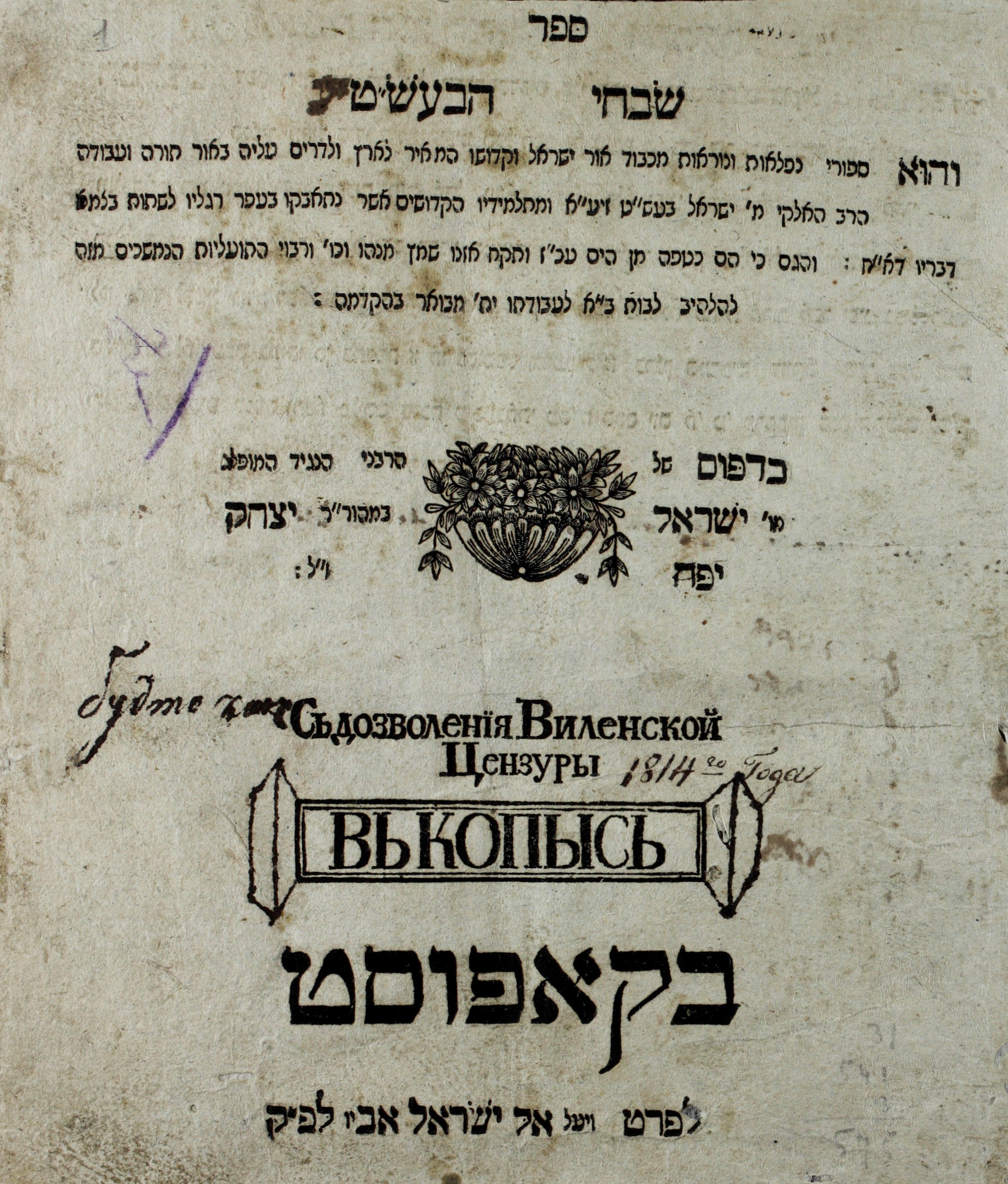 שער הספר "שבחי הבעש"ט", מהדורה ראשונה, קאפוסט התקע"ה